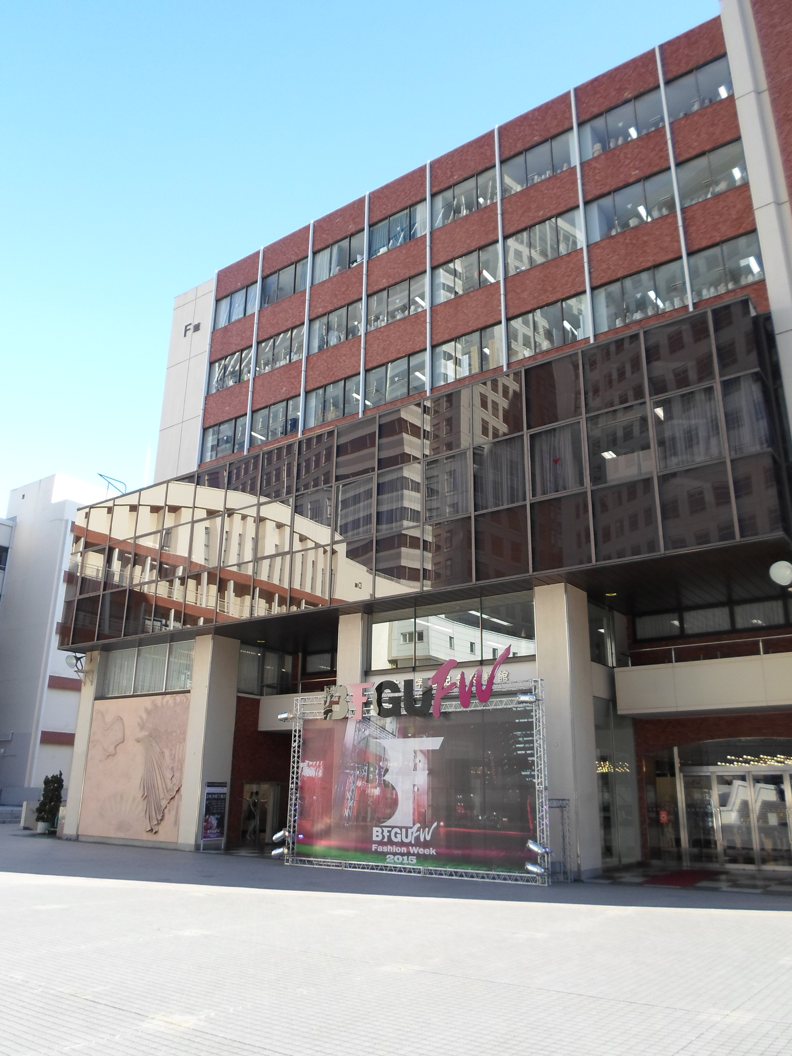 文化学園遠藤記念館、日本東京渋谷区文化学園。